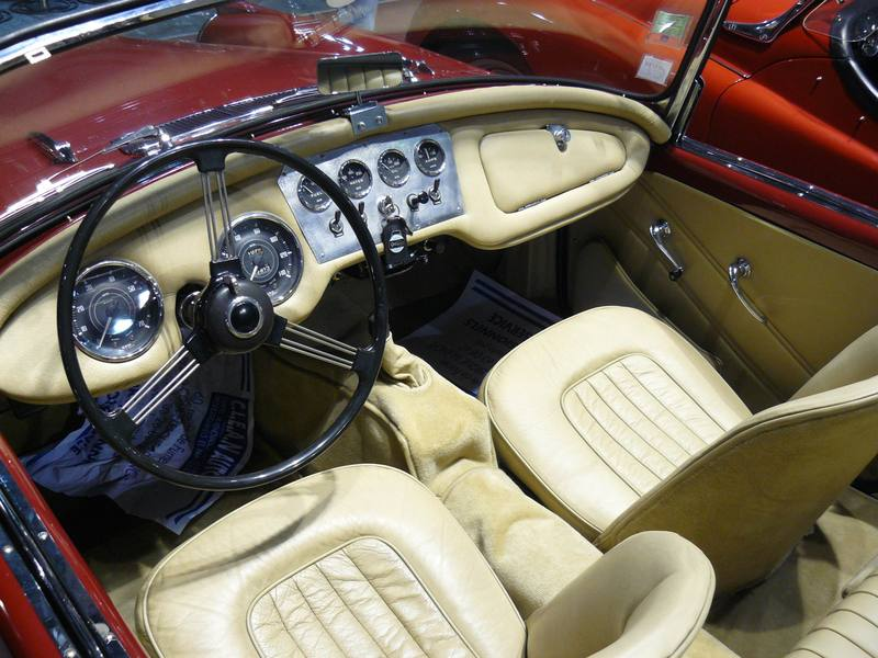 Retromobile 2012